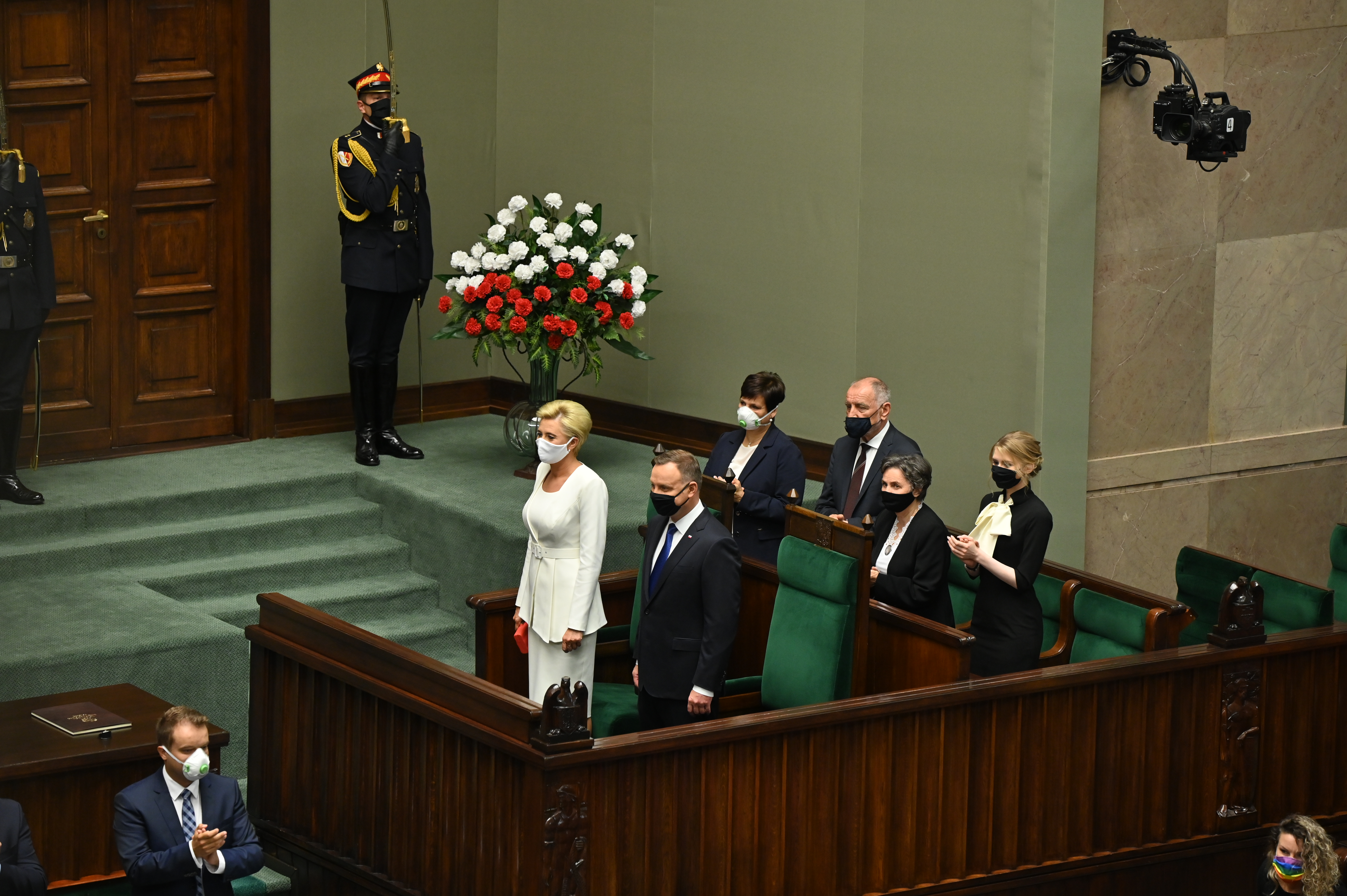 Fot. Kancelaria Sejmu/Aleksander Zieliński podczas uroczystość zaprzysiężenia Prezydenta RP Andrzeja Dudy przed Zgromadzeniem Narodowym